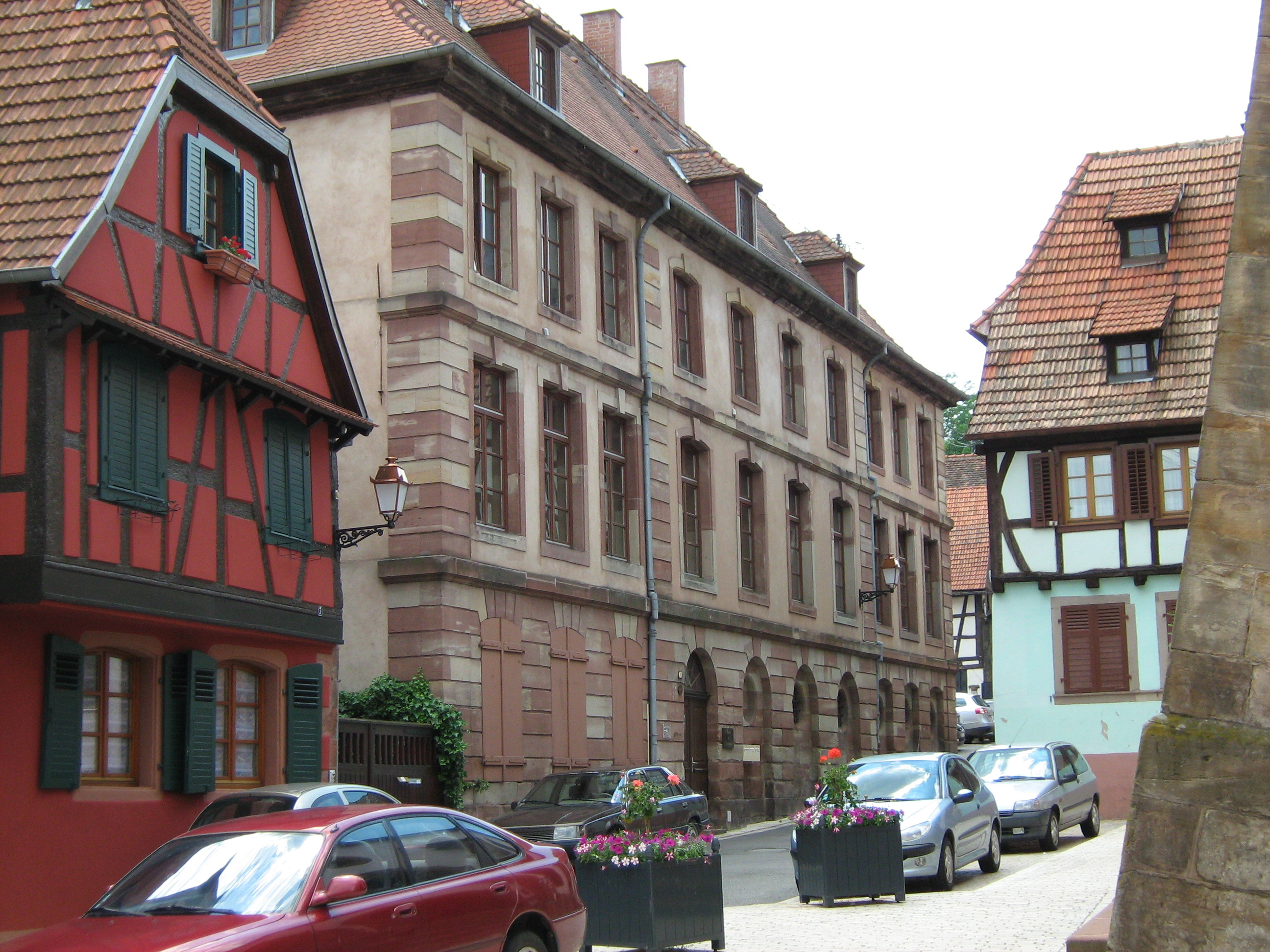 Ancien Collège de Bouxwiller (67) France.